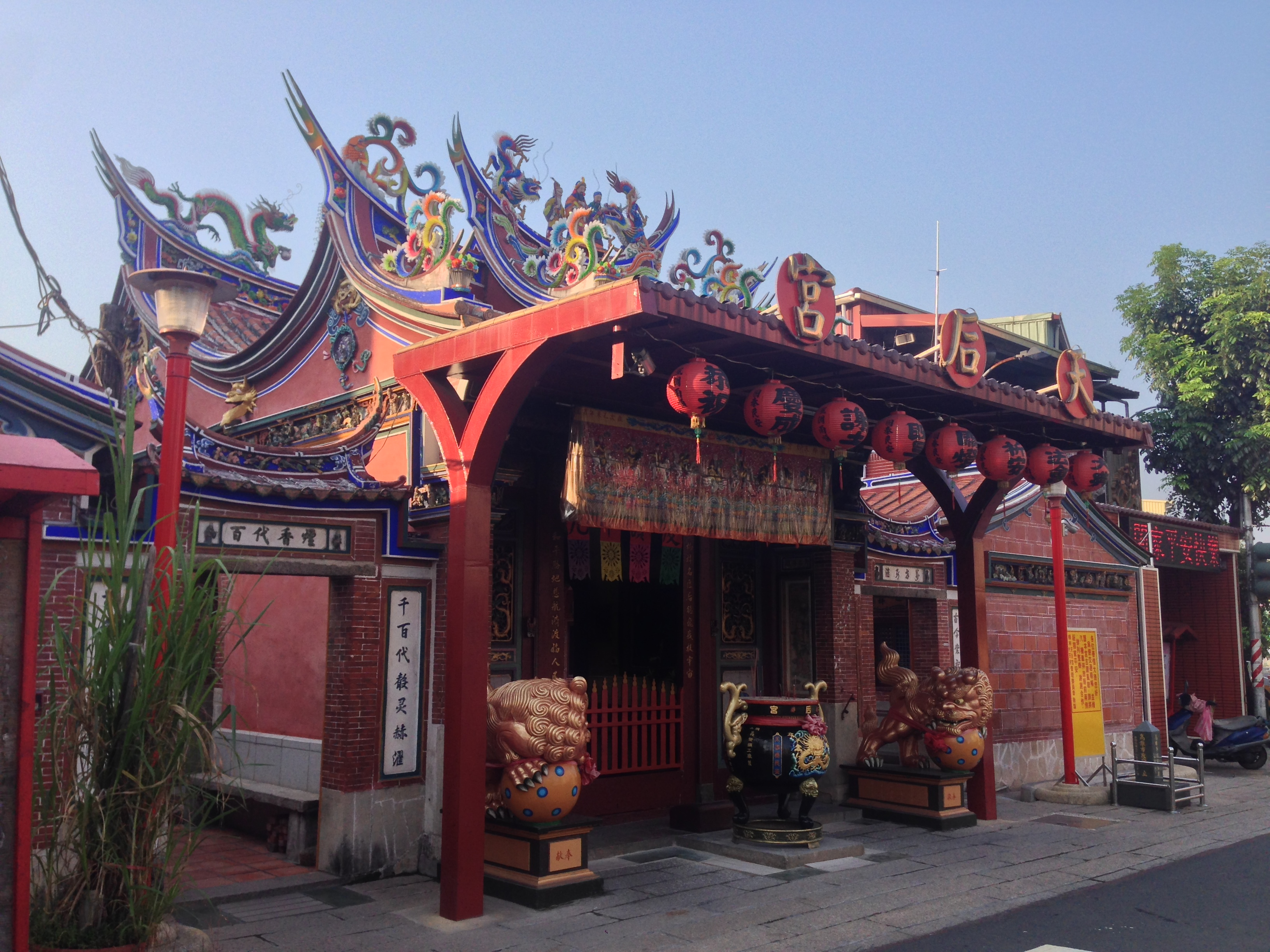 中文（台灣）: 楠梓天后宮